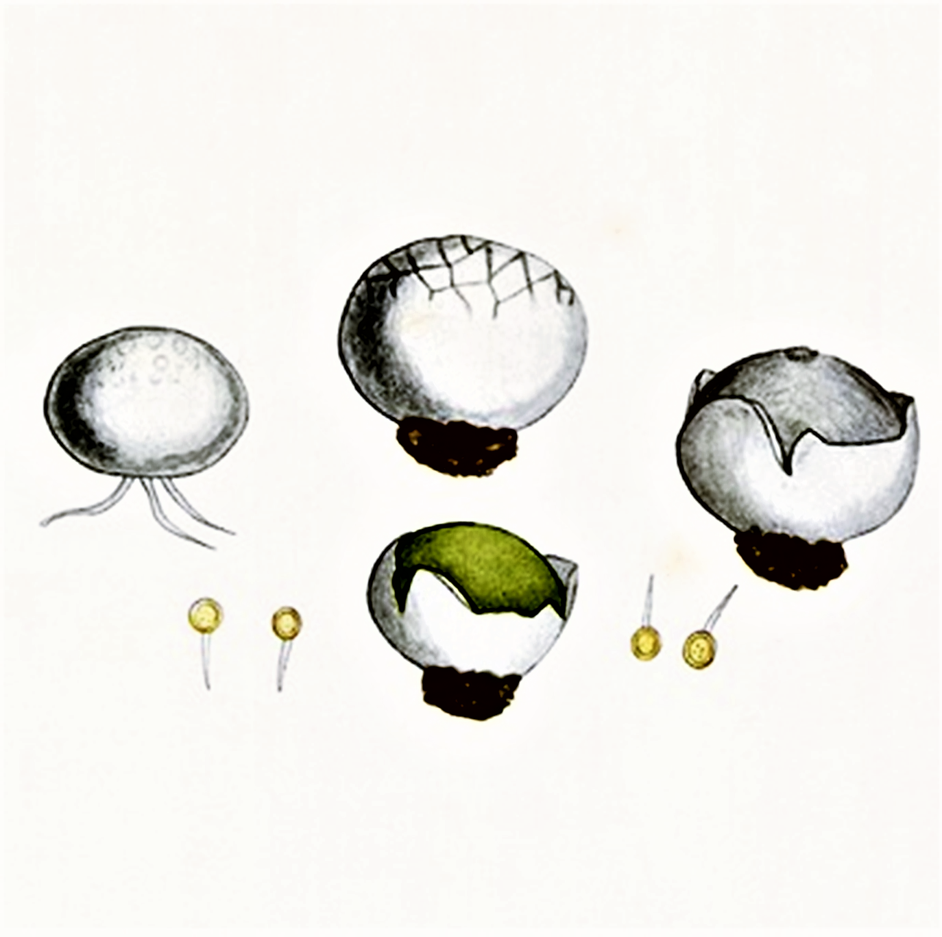 Giacomo Bresadola: Bovista plumbea (Pers., 1795)